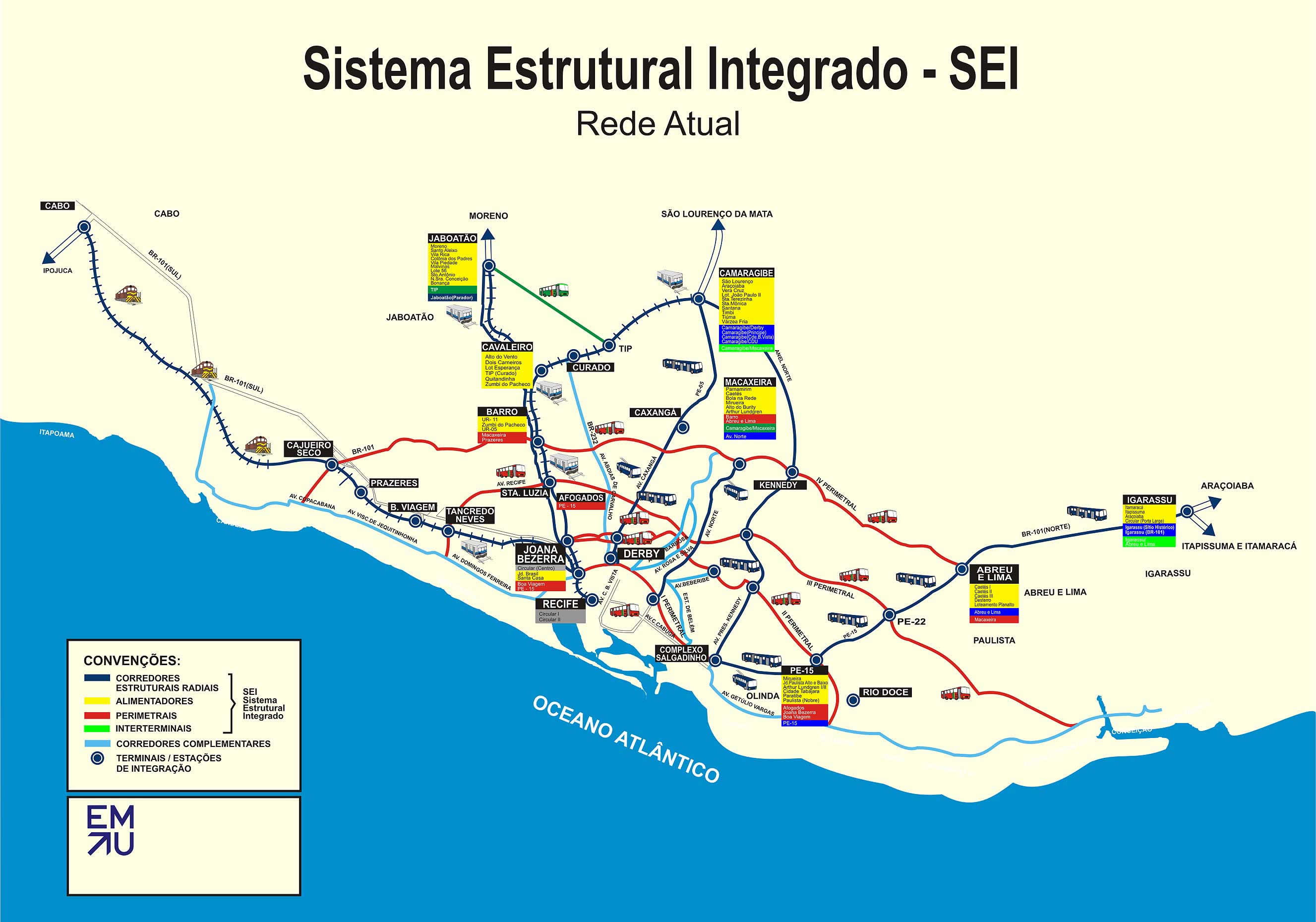 Mapa do Sistema Integrado de Transporte